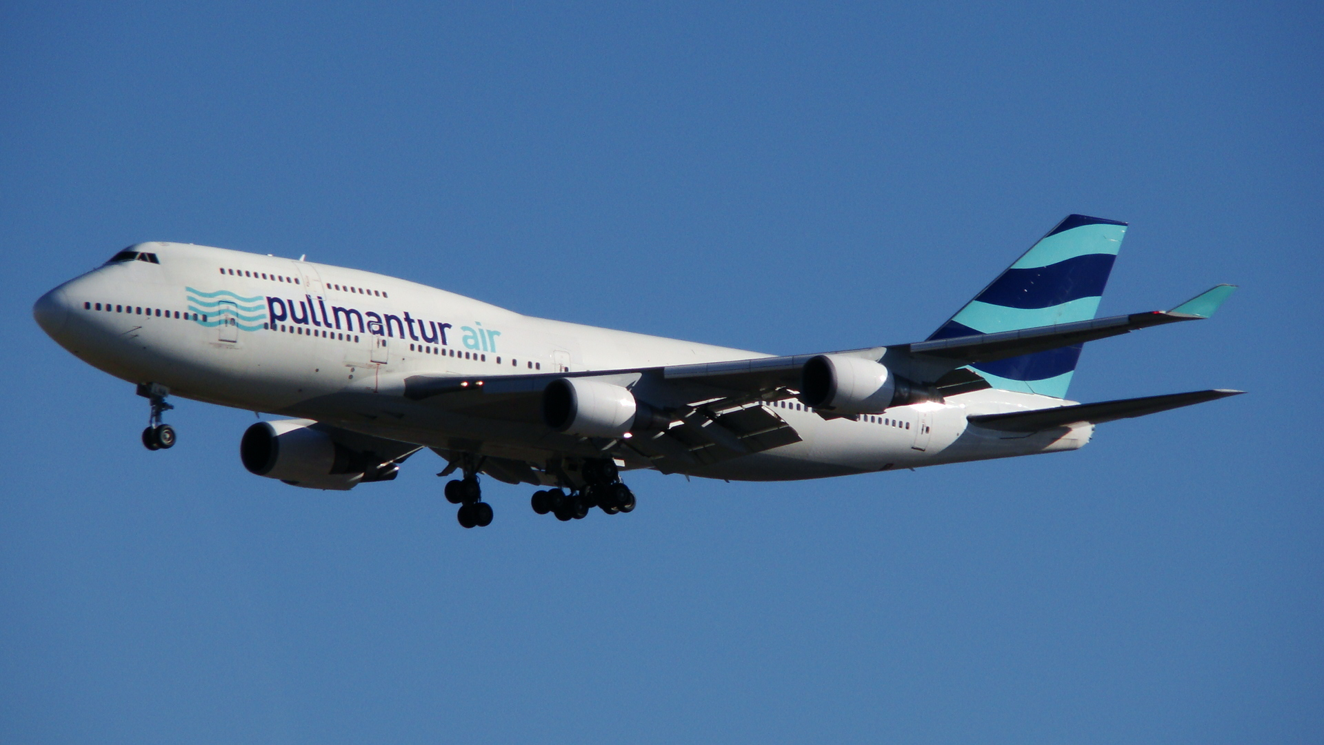 Boeing 747-446 (EC-LNA) de Pullmantur Air (ahora Wamos Air) aterrizando en el aeropuerto Adolfo Suárez Madrid-Barajas.